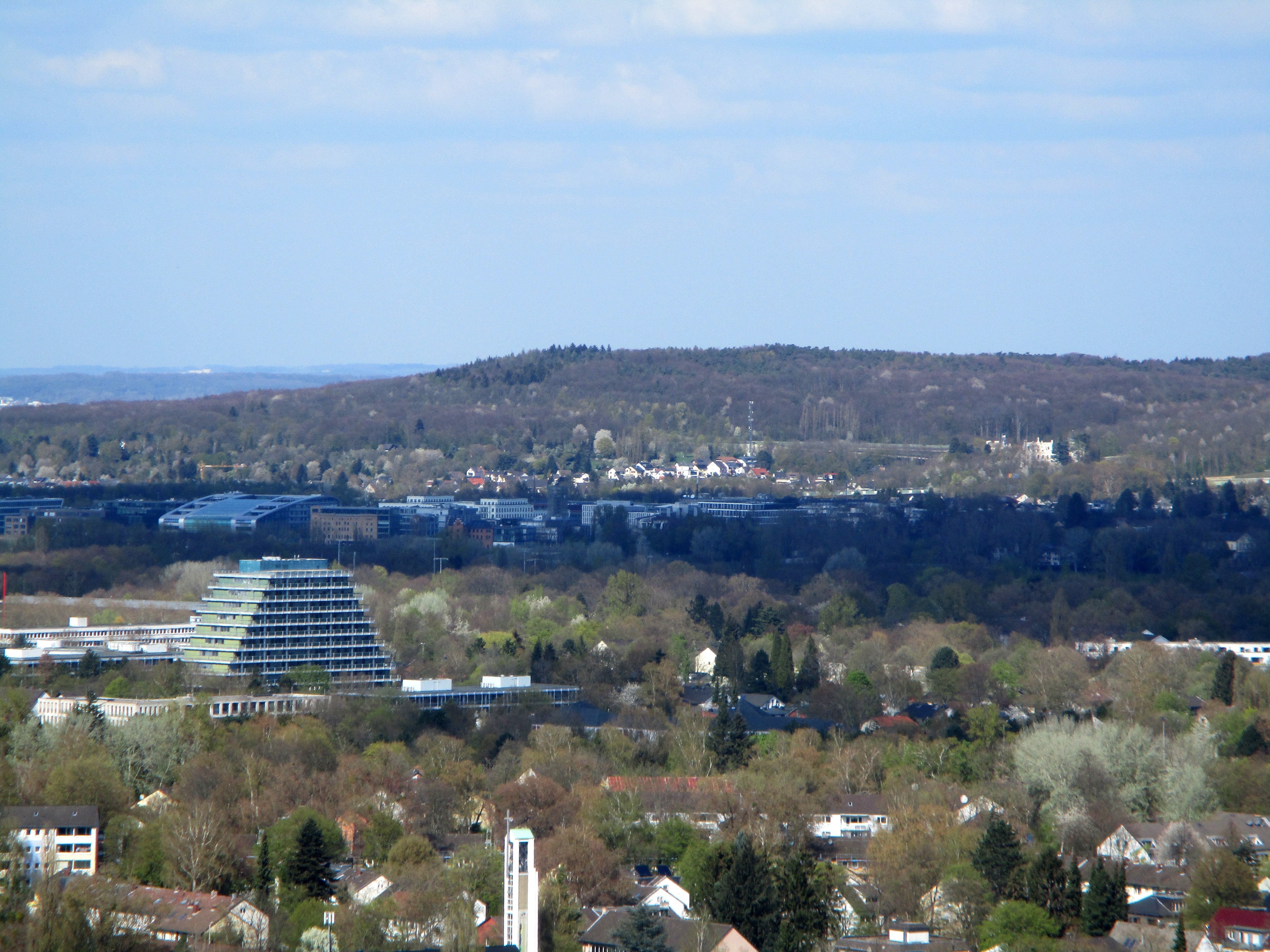 Blick vom Bergfried der Godesburg zum Nordteil und Nordabfall des Ennert, in der Mitte der gleichnamige Gipfel